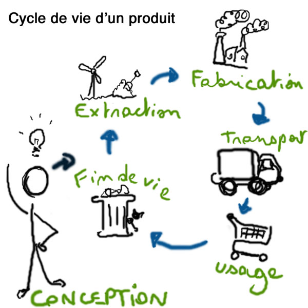 cycledevieecodesign